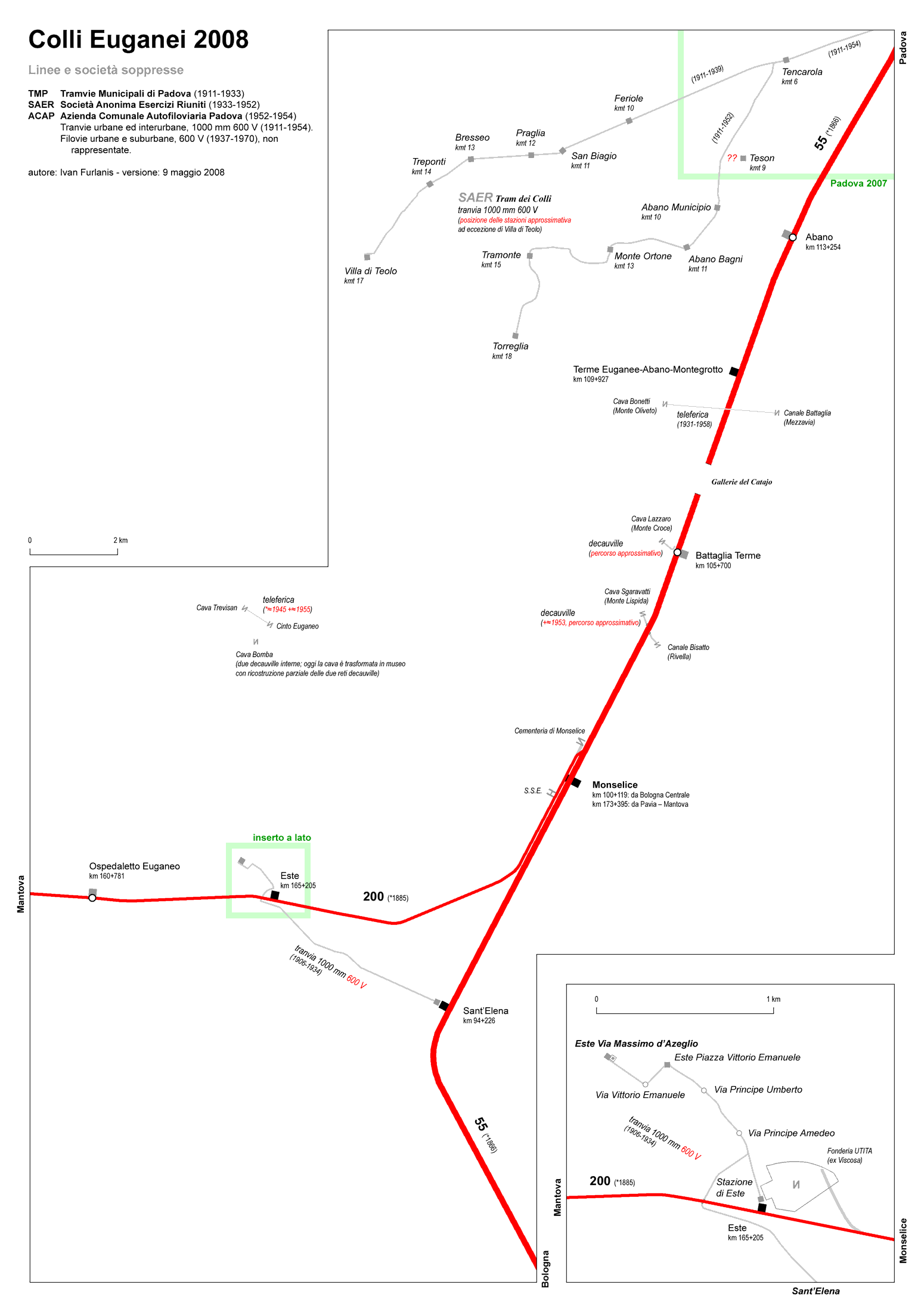 Mappa ferroviaria e tranviaria dei Colli Euganei. Legenda.